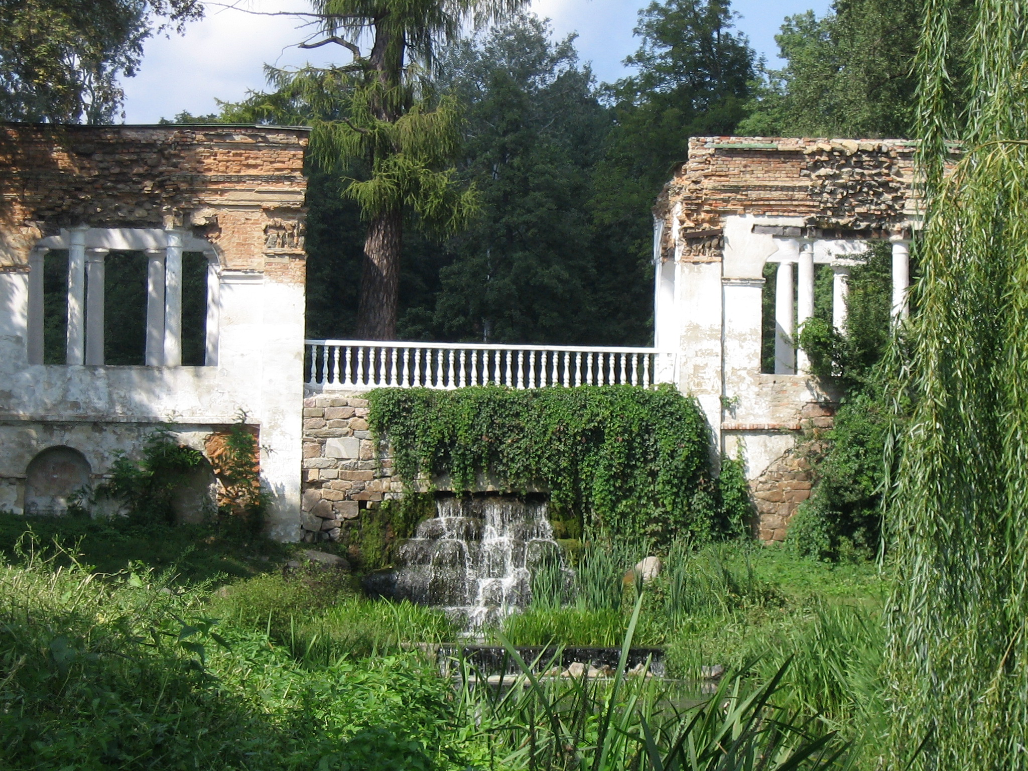 Державний дендрологічний парк «Олександрія» НАН України. Руїни